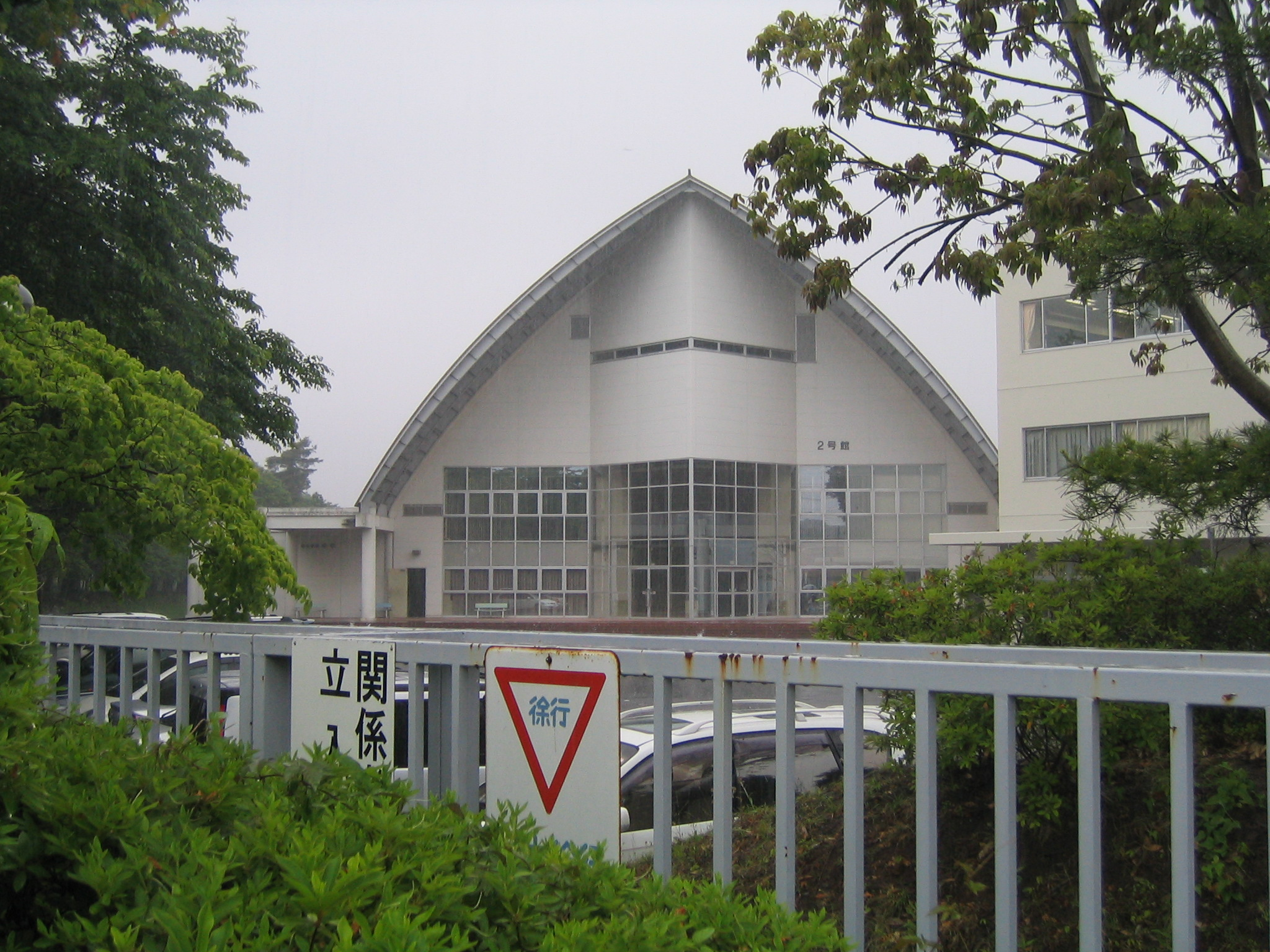 筑波研究学園専門学校2号館（旧・国際科学技術博覧会ソ連館）